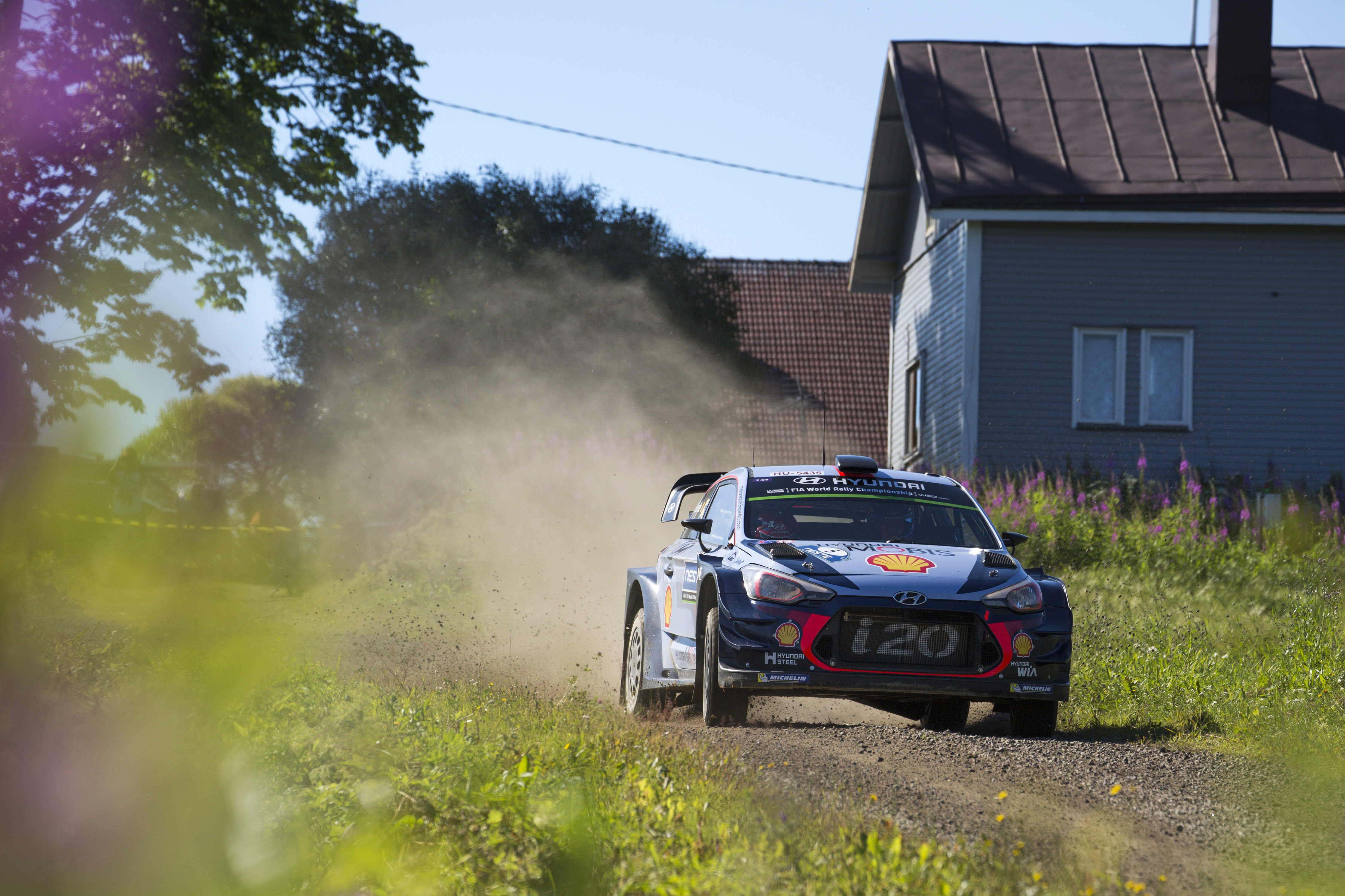 Thierry Neuville podczas Rajdu Finlandii 2017